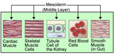 Mesoderm